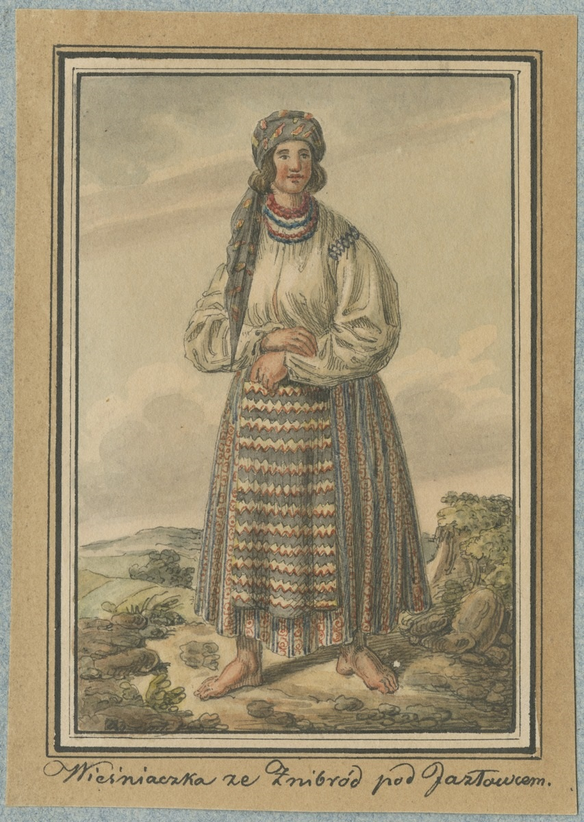 Босонога селянка в барвистому вбранні, з с. Жнибороди під м. Язлівцем.